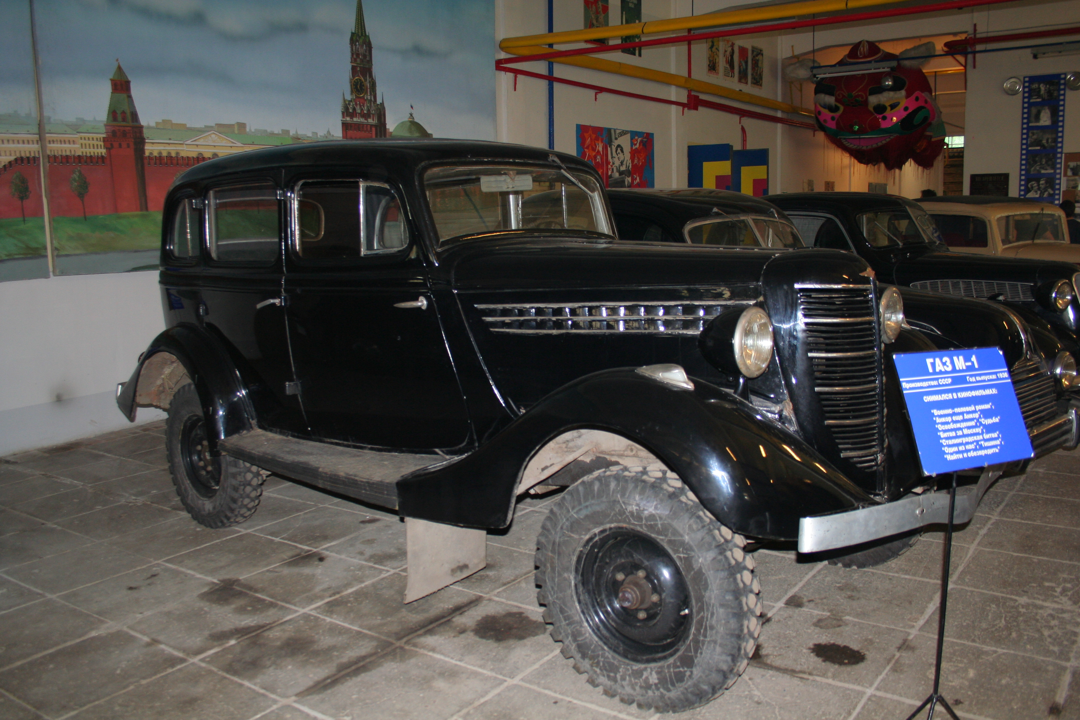 Museum auf dem Gelände des Filmstudios Mosfilm in Moskau. Die Exposition. GAZ-M1, Baujahr 1936. Mindestens Kühlergrill und Motorabdeckung stammen von der Sechszylinderversion GAZ-11-73.